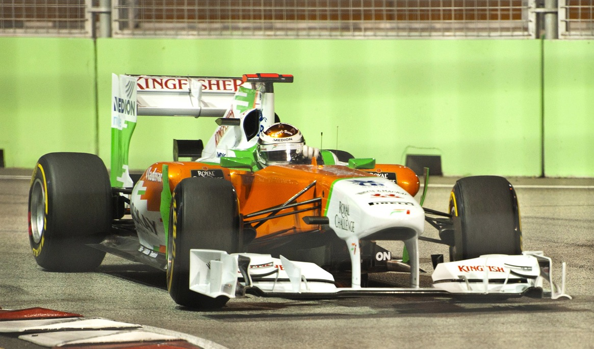 Sutil Singapore 2011